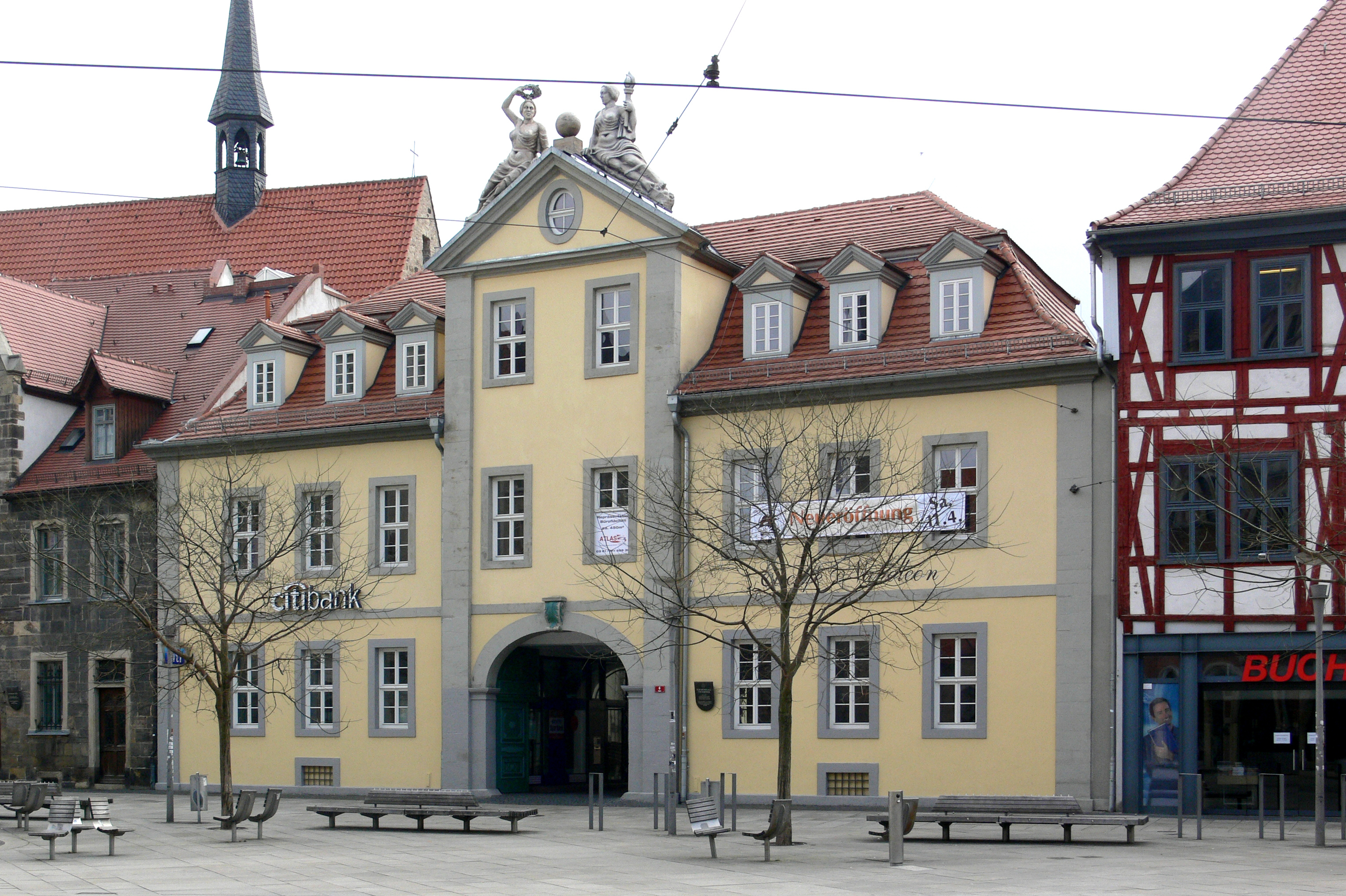 Erfurt, Anger Anger 6 (Eiscafé Napoleon)